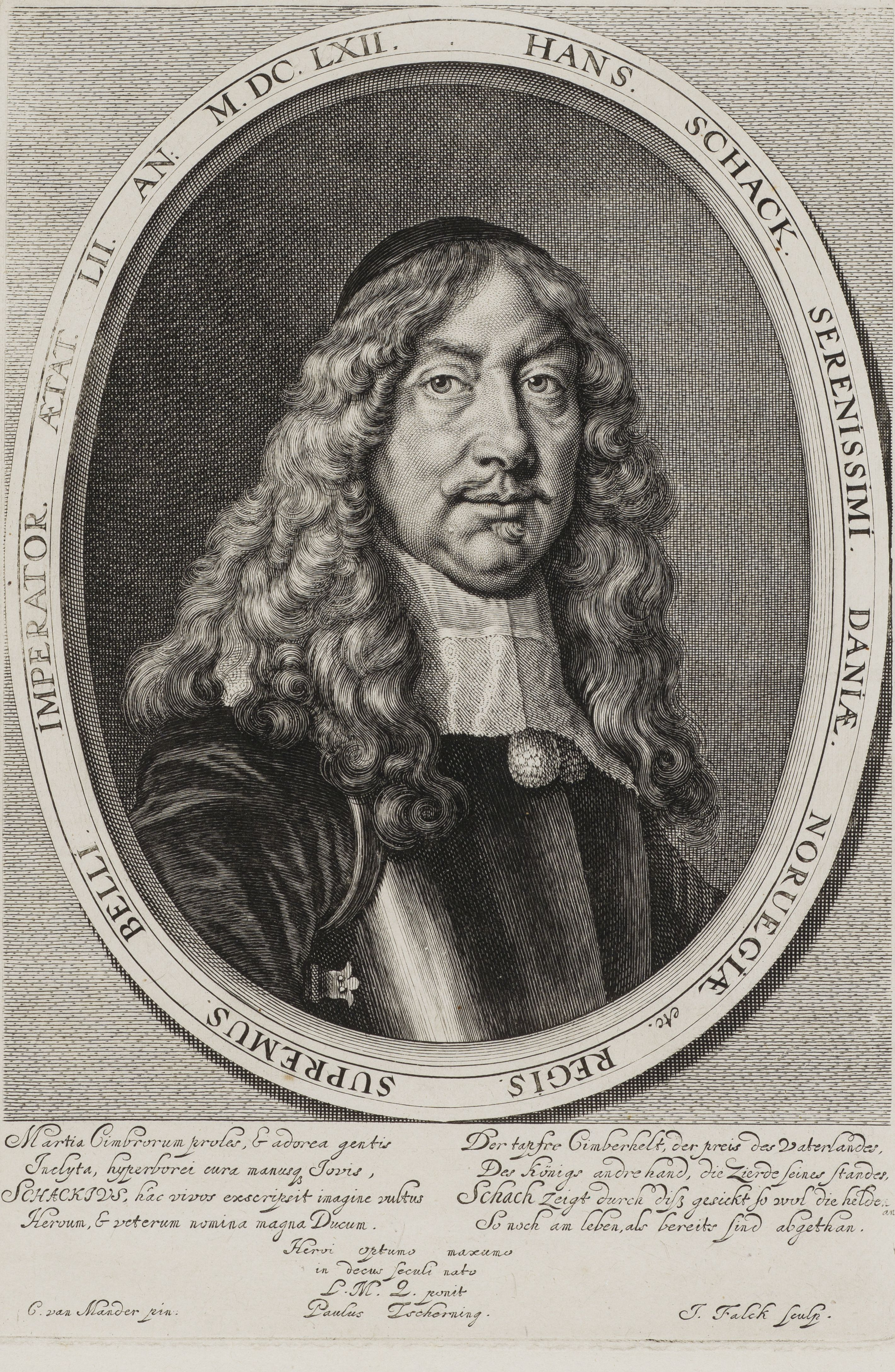 Bildnis von Hans Schack